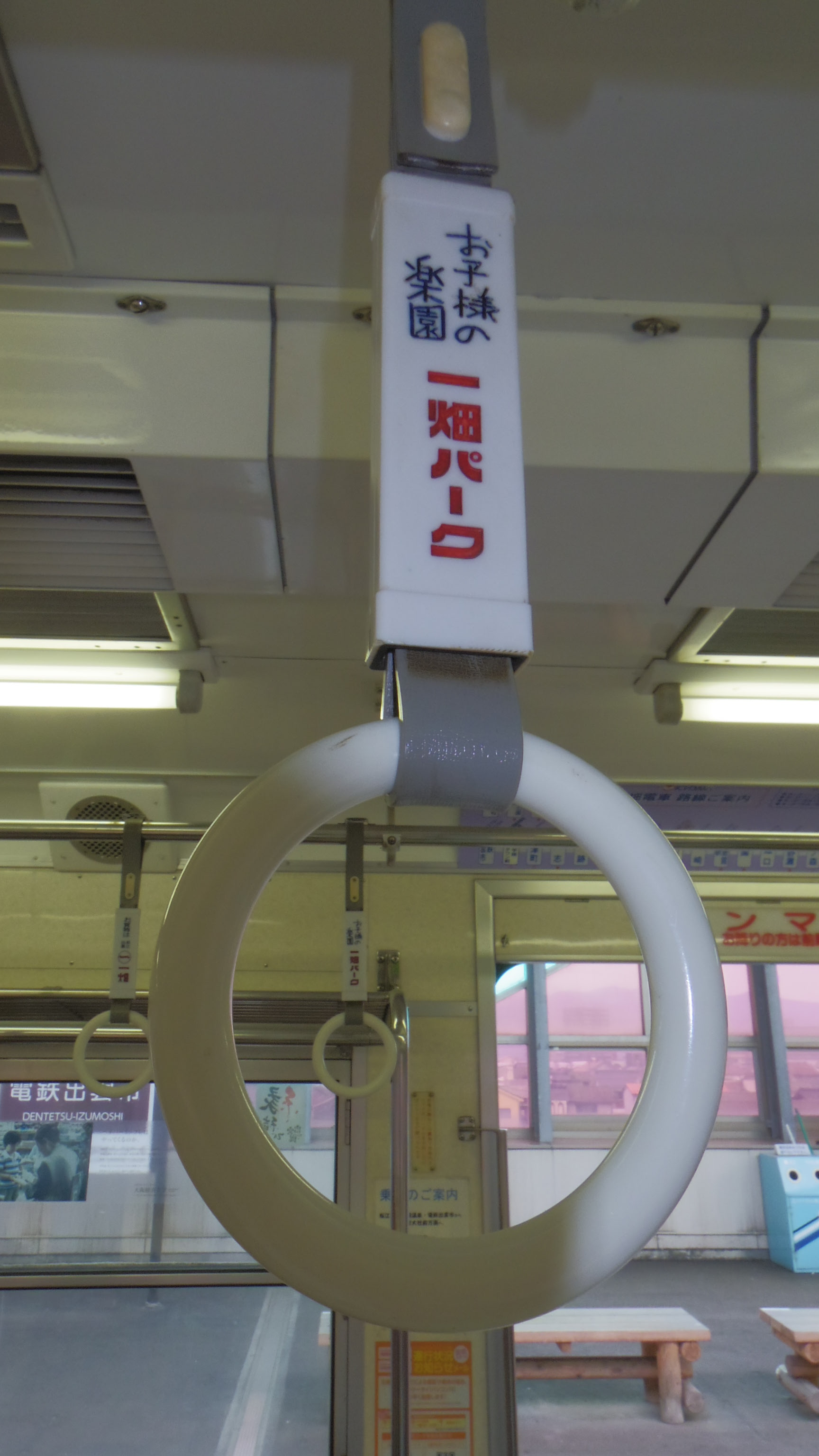 一畑電車北松江線を走る2100系車内にある、かつて一畑沿線内に存在した遊園地「一畑パーク」の広告が今なお残る吊革。「お子様の楽園 一畑パーク」とある。